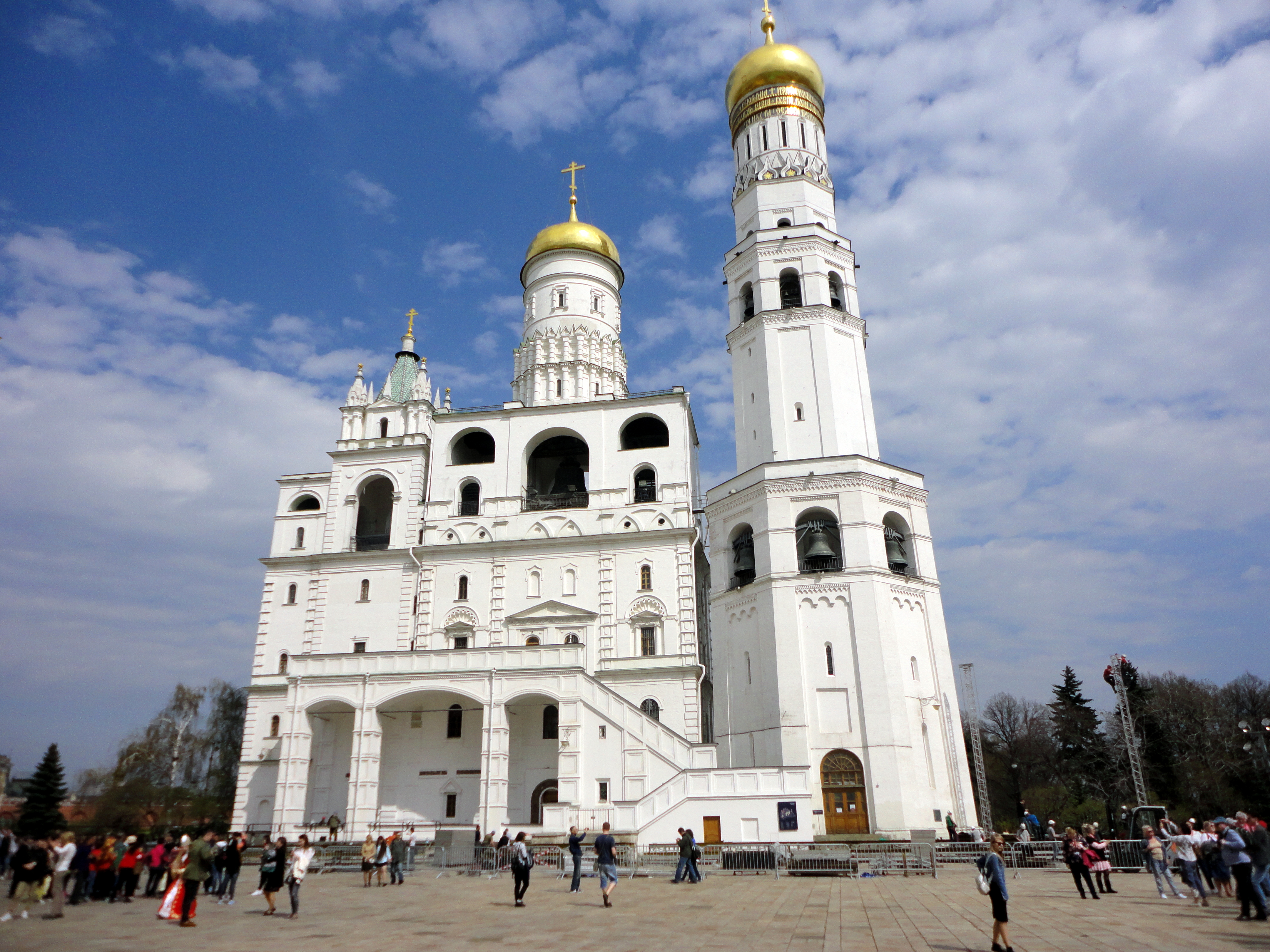 Колокольня Ивана Великого: нет адреса БТИ, Тверской, Центральный округ, Москва